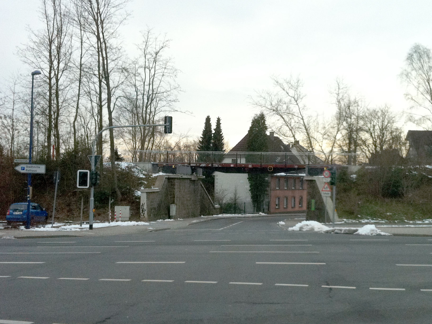 Die Waggonbrücke in Heiligenhaus. Ein ehemaliger Rungen-Flachwagen dient als Brücke für den Panorama-Radweg über die Bahnstraße